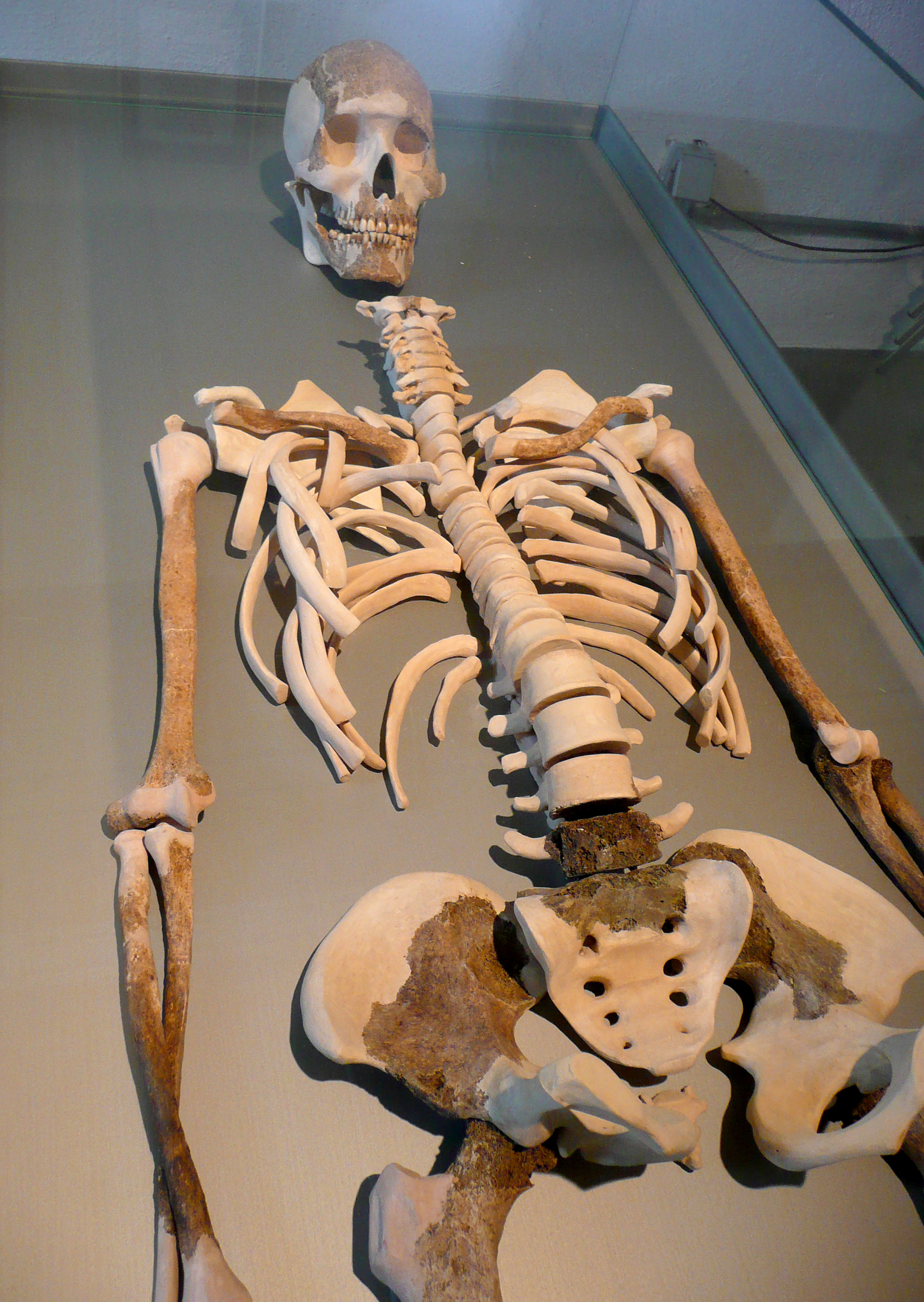 Oberes Skelett (rekonstruierte Teile heller) des Kriegers von Kemathen im Römer und Bajuwaren Museum auf der Burg Kipfenberg im oberbayerischen Landkreis Eichstätt.